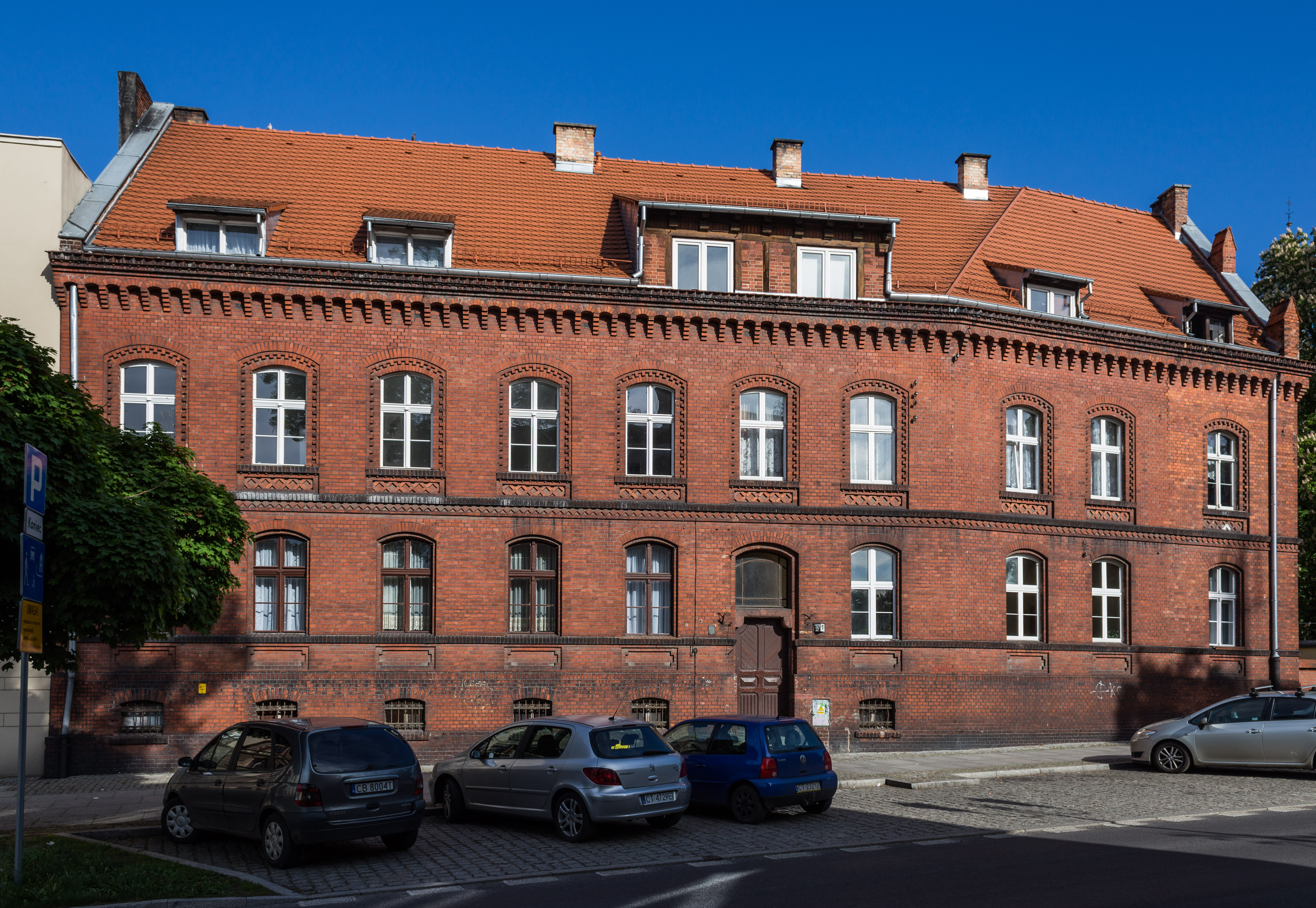 Toruń, budynek przy ul. Wola Zamkowa 17, pierwotnie siedziba Urzędu Fortyfikacyjnego.